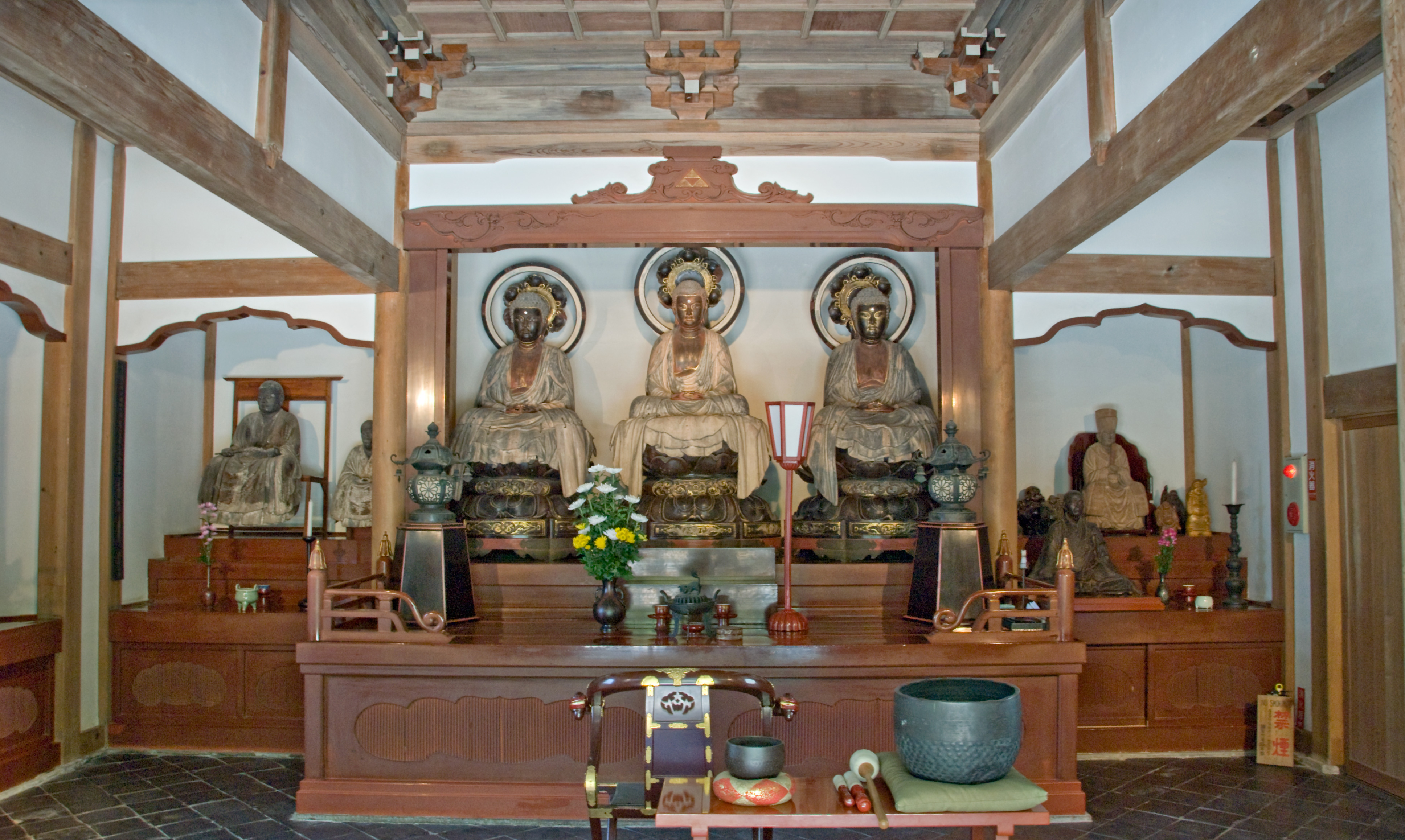 Statues of Amida, Shaka and Miroku (Sanzebutsu). Jochi-ji, Kita-Kamakura